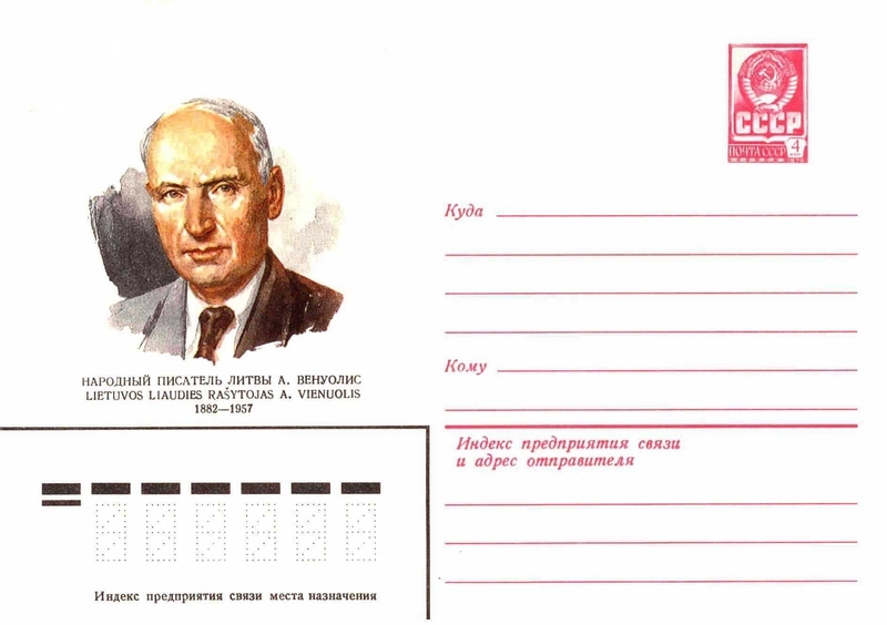 Художественные маркированные конверты 1982 года.